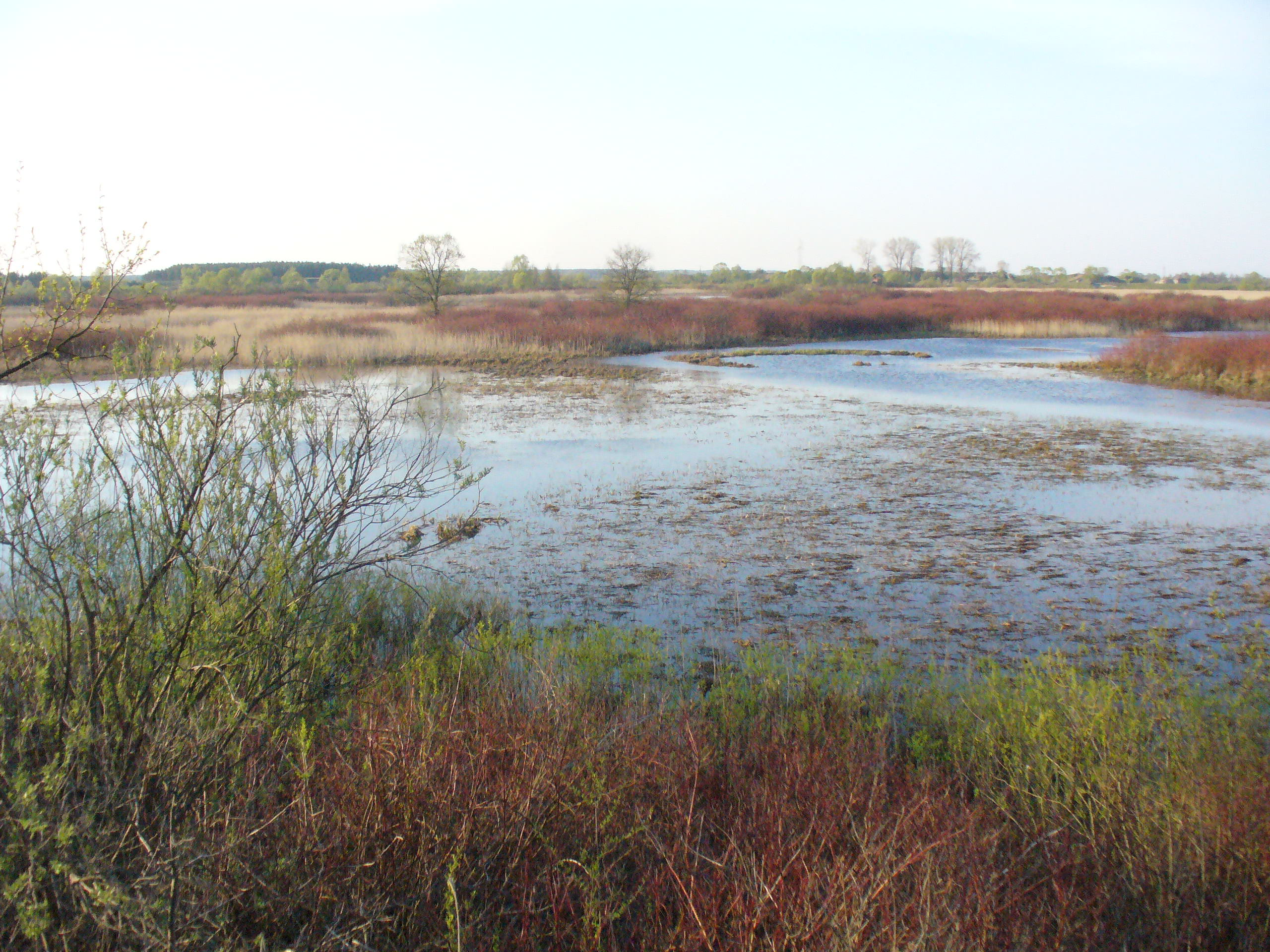 biebrzańskie bagna